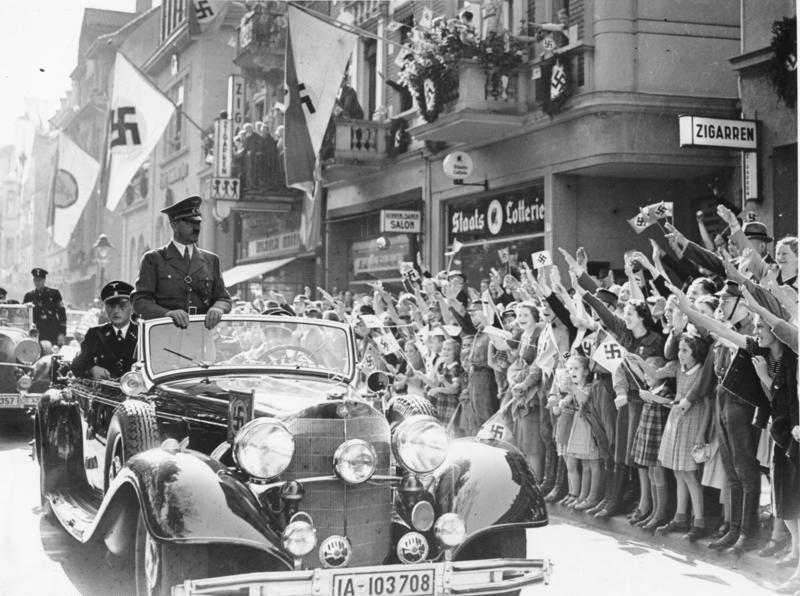 Scherl: Zur Besprechung des Führers mit dem englischen Ministerpräsidenten Chamberlain in Bad Godesberg a/Rhein Unter dem Jubel der Bevölkerung führt der Führer vom Bahnhof Godesberg zum Hotel Dreesen, wo die Besprechung stattfindet. Fot.: 22.9.38